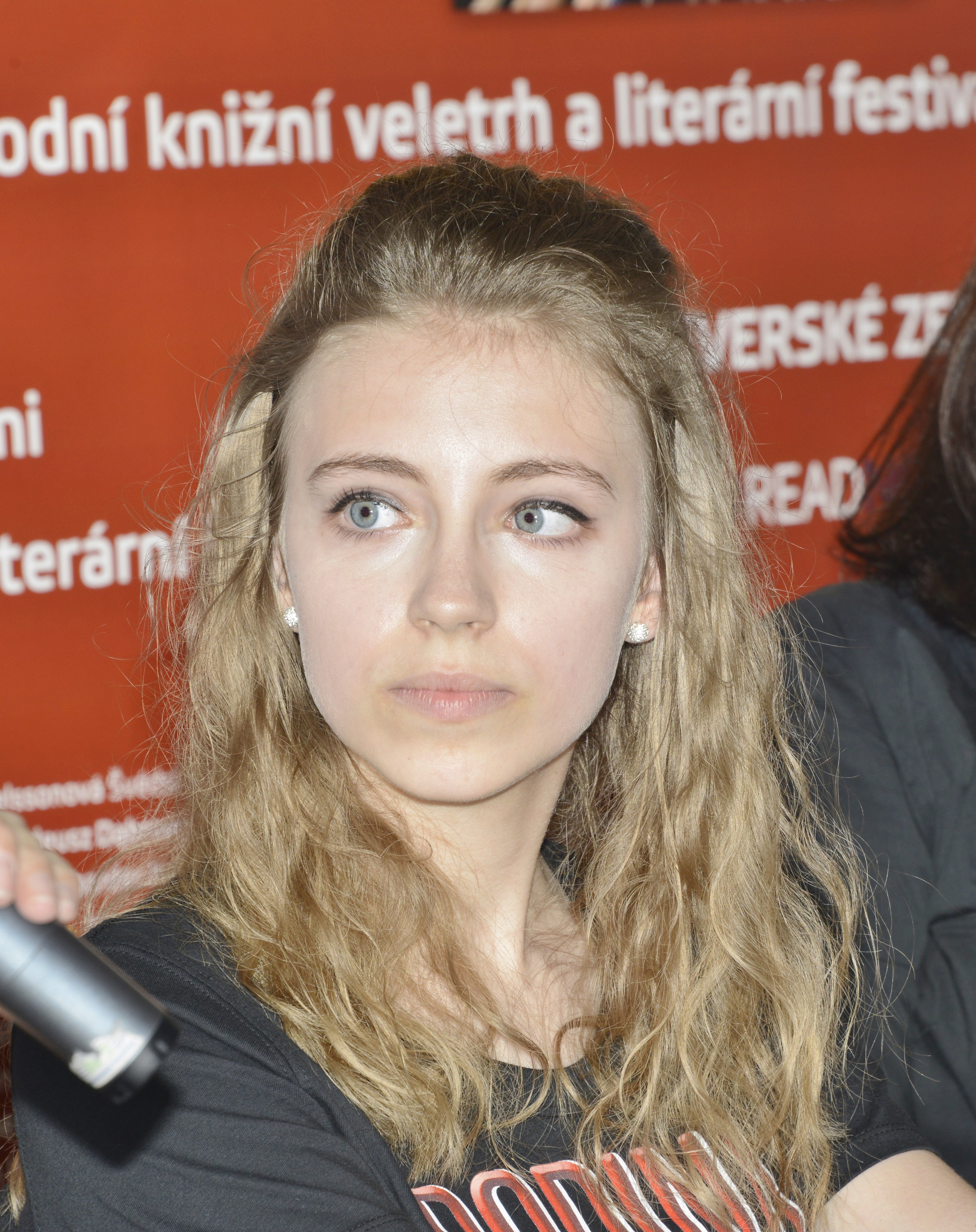 Osm světů Marcela Remeňová - autorka série